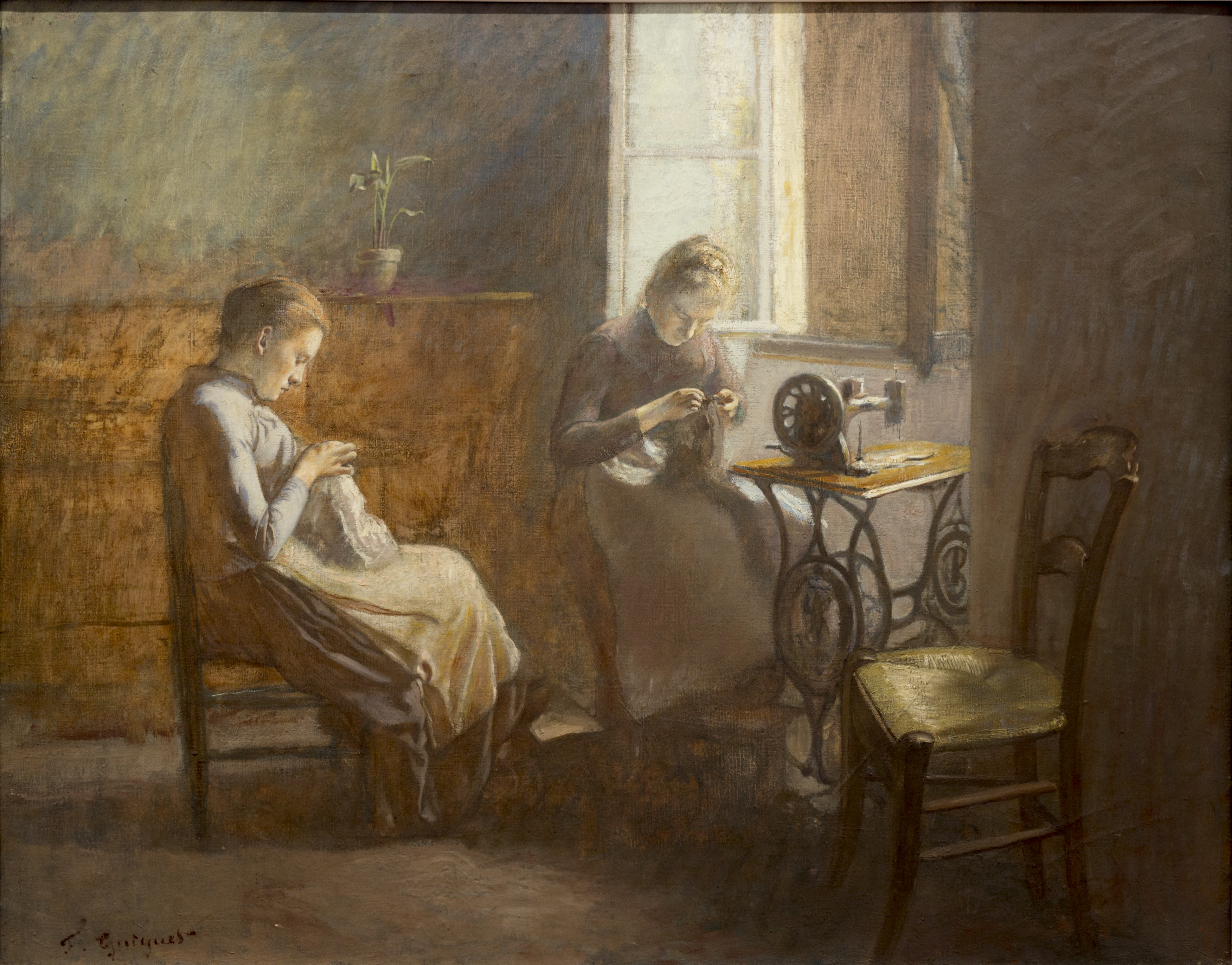 Les Ouvrières